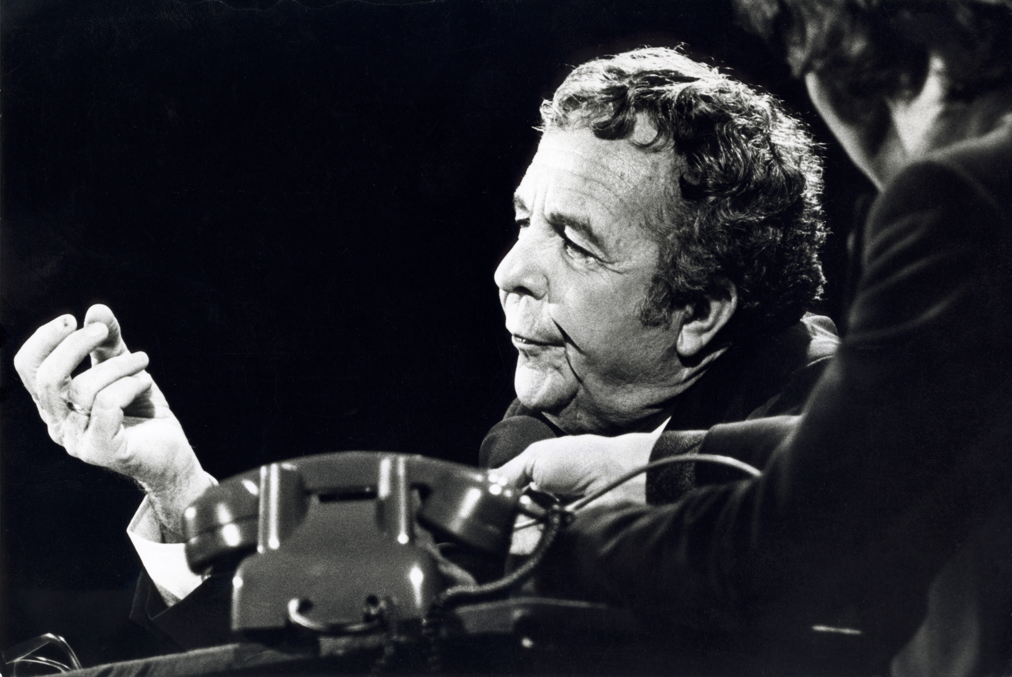 Wim Kan tijdens oudejaarsconference ge-interviewd als Den Uyl. 1976.